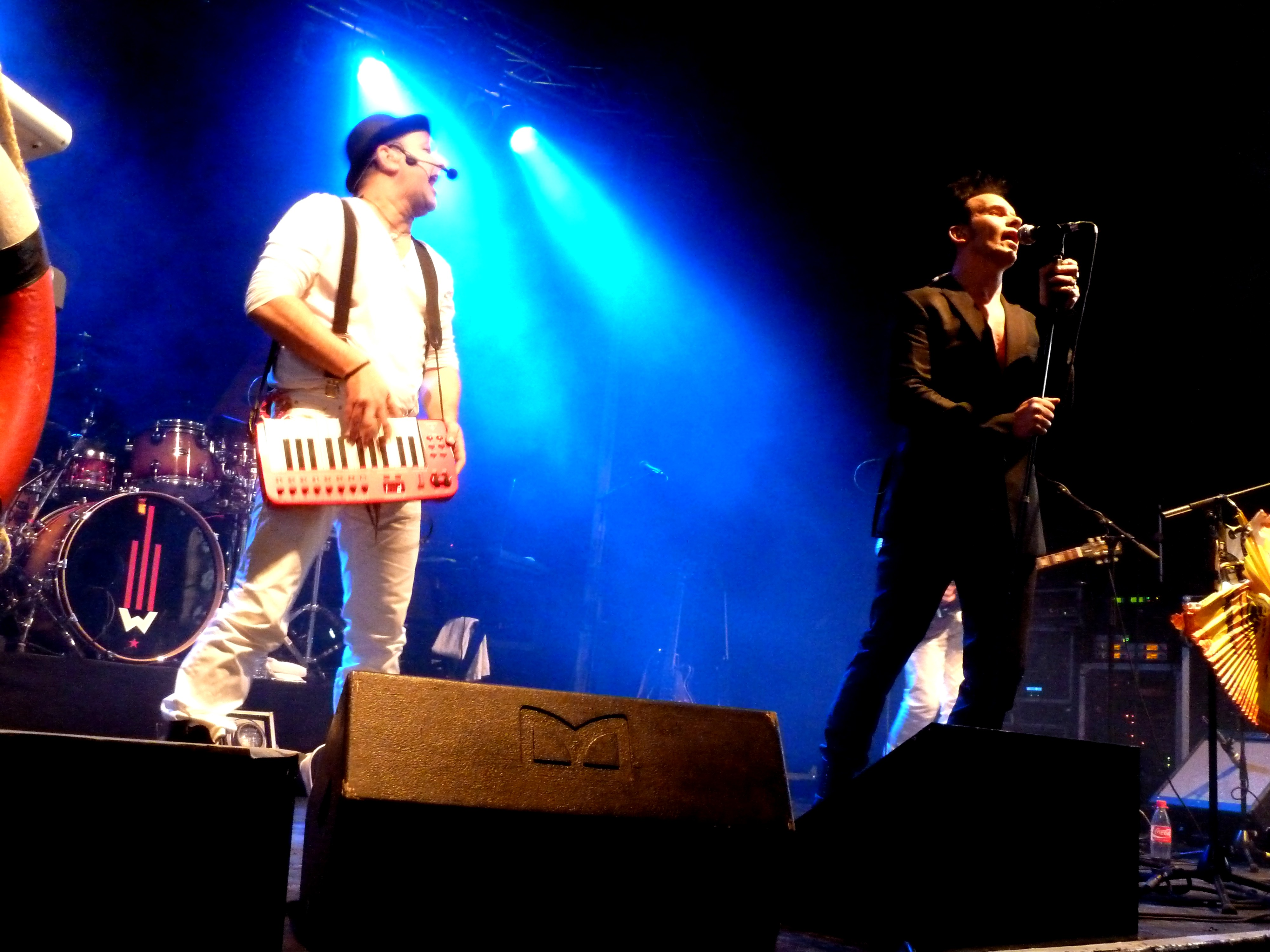 Leichtmatrose